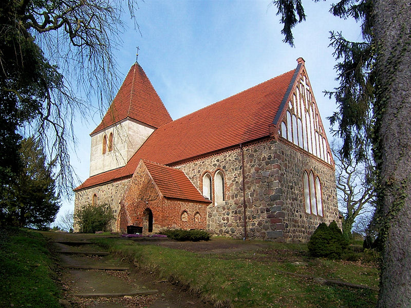 Kirche in Zehna, Landkreis Rostock